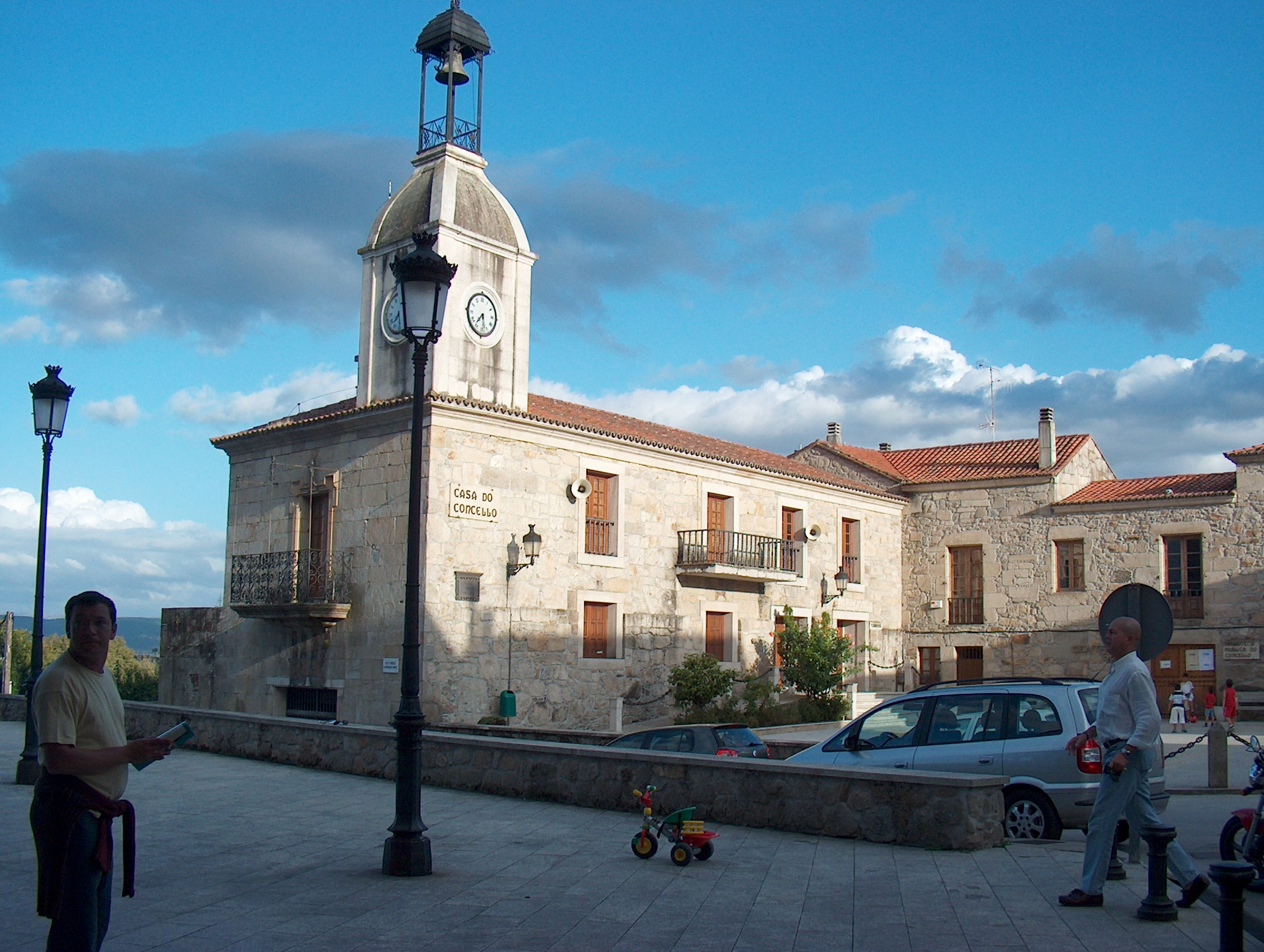 Casa do Consello de Ferreira do Pantón